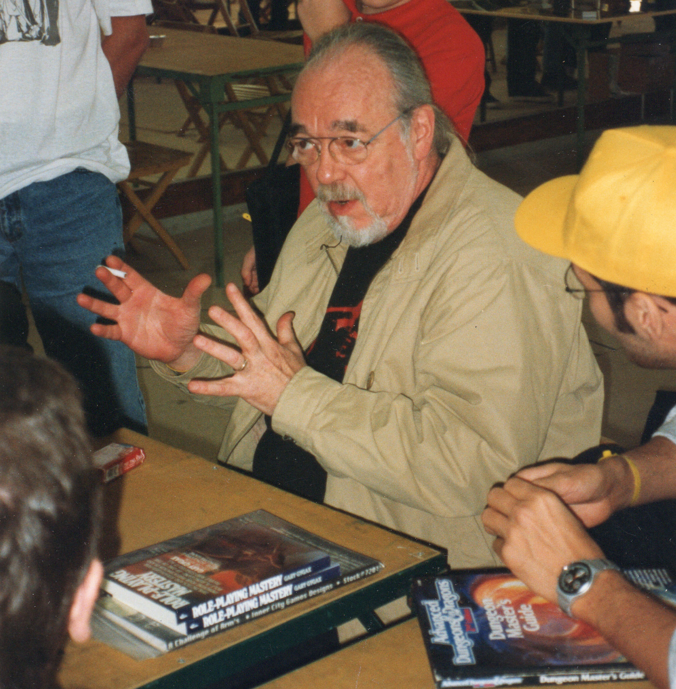 Gary Gygax, autore del gioco di ruolo Dungeons and Dragons alla convention di giochi ModCon, settembre 1999.